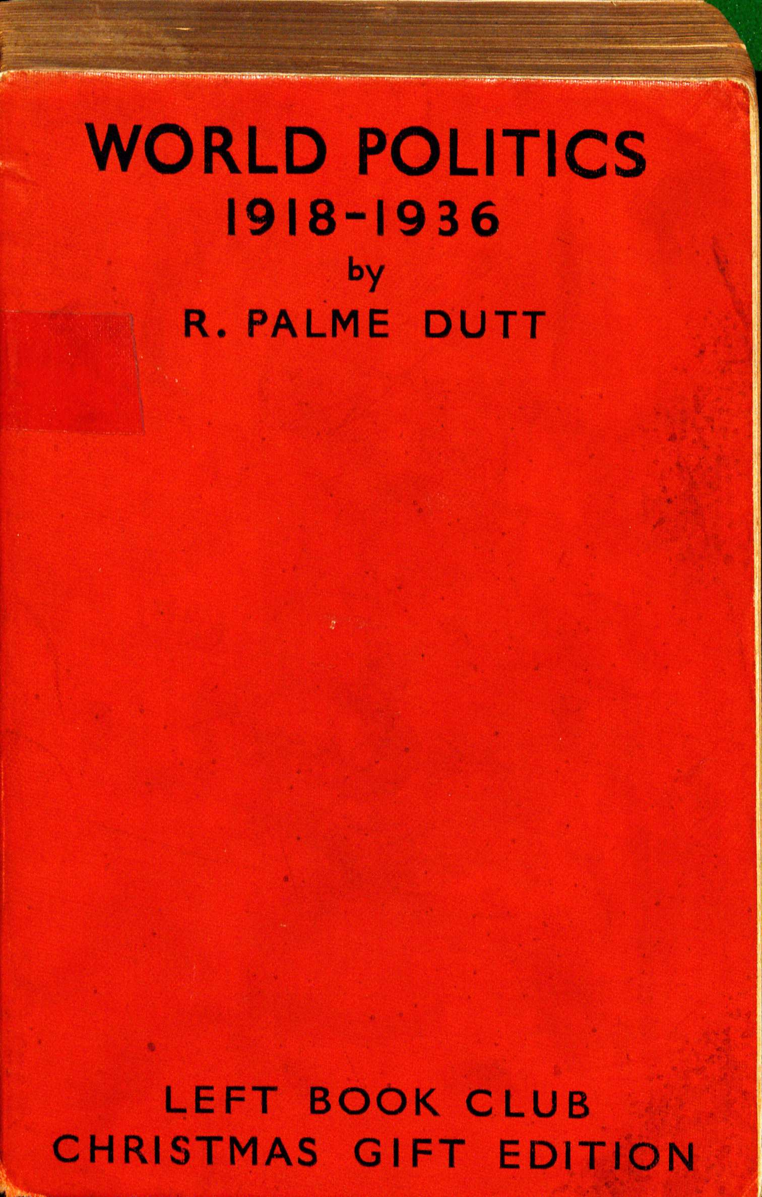 Rajani Palme Dutt World Politics 1936 cover